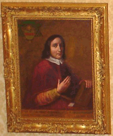 S.E.Rev.ma Stefano Quaranta Arcivescovo di Amalfi